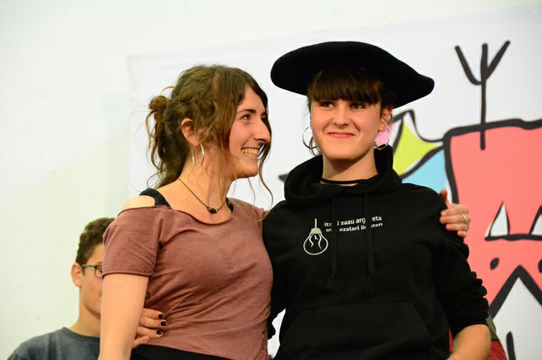 Irati Alcantarilla Euskal Herriko Eskolarteko 2019ko txapelduna